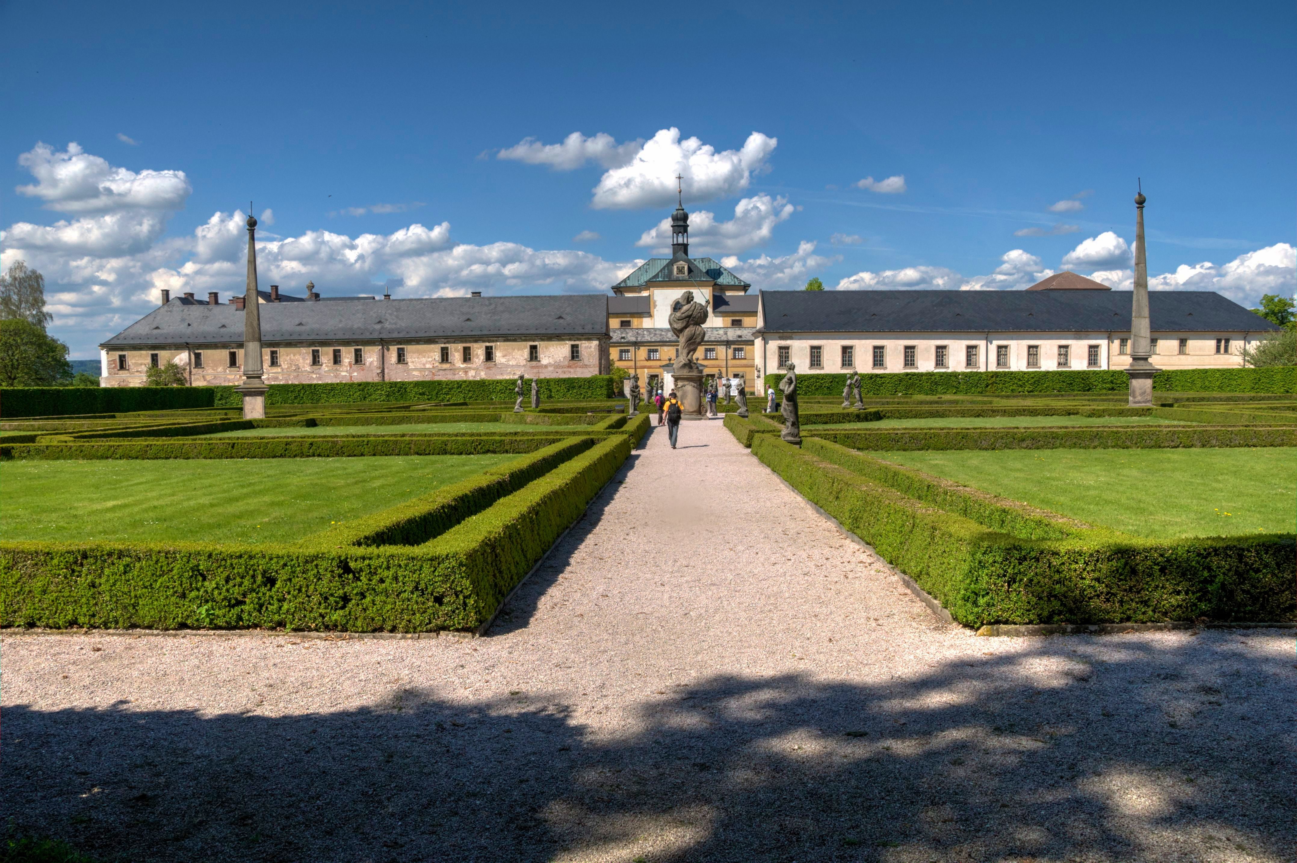 Kuks. Zadní trakt Hospitalu, pohled ze špitální zahrady